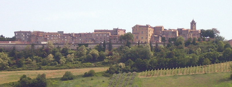 Carassai (AP)